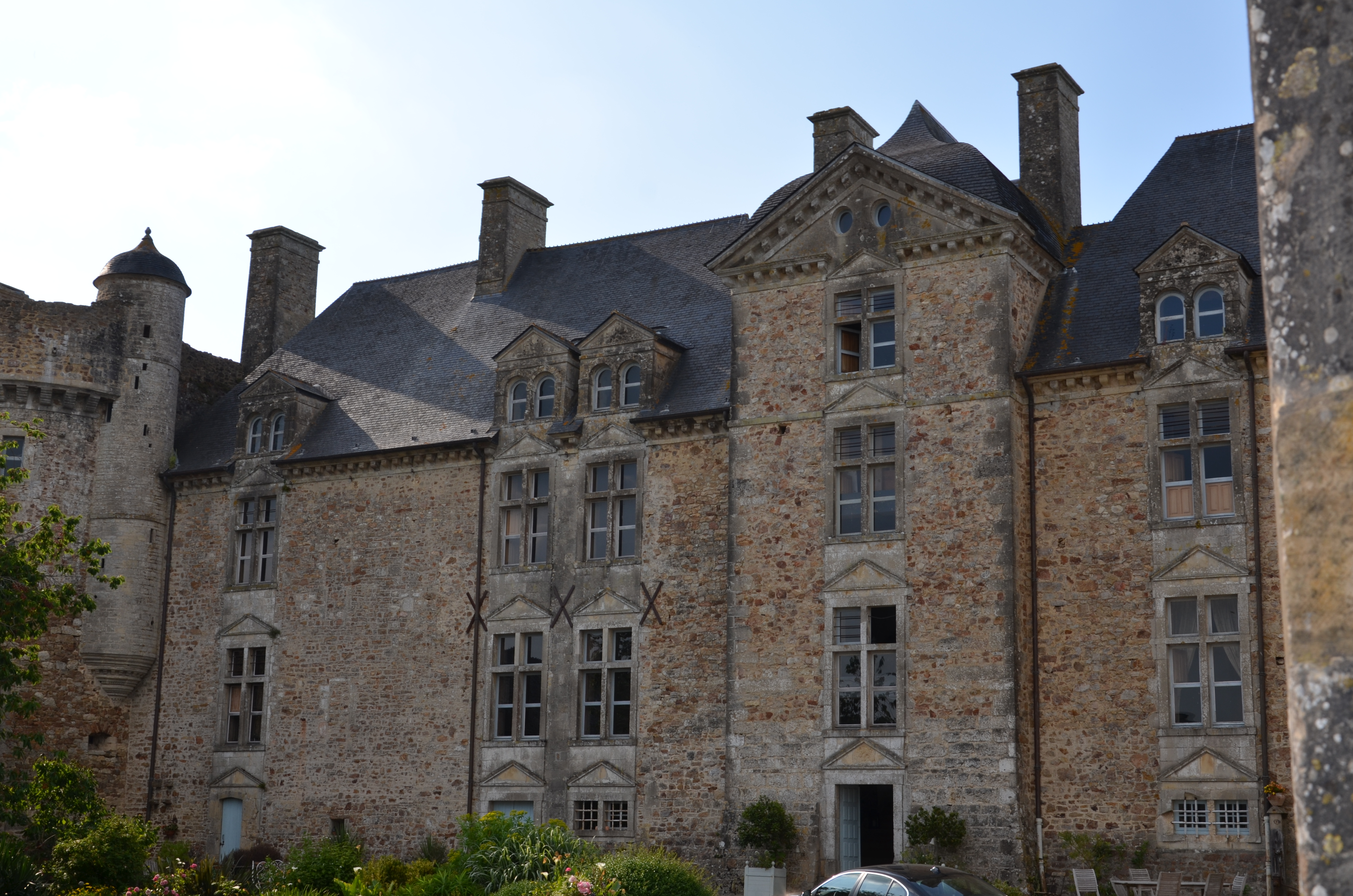 Château de Crosville-sur Douve.